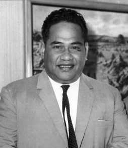 Bild durch den Hotmail-Benutzer "Dokai" ([1]) autorisiert und unter der GFDL freigegeben; auch veröffentlicht durch "Dokai" unter [2] Bilde:Gadabu og DeRoburt 1968.jpg